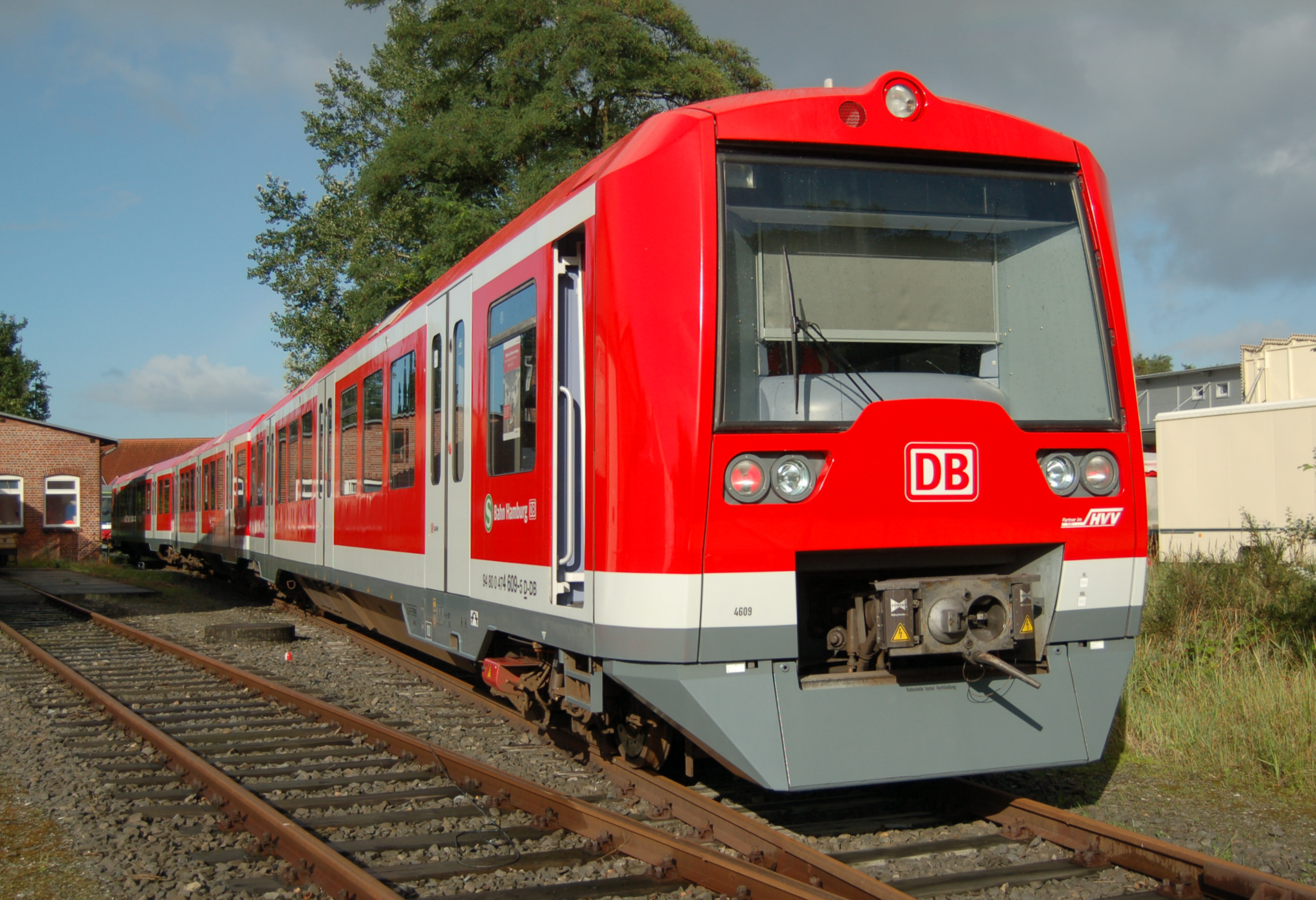 Triebwagen "DBAG Baureihe 474.3"